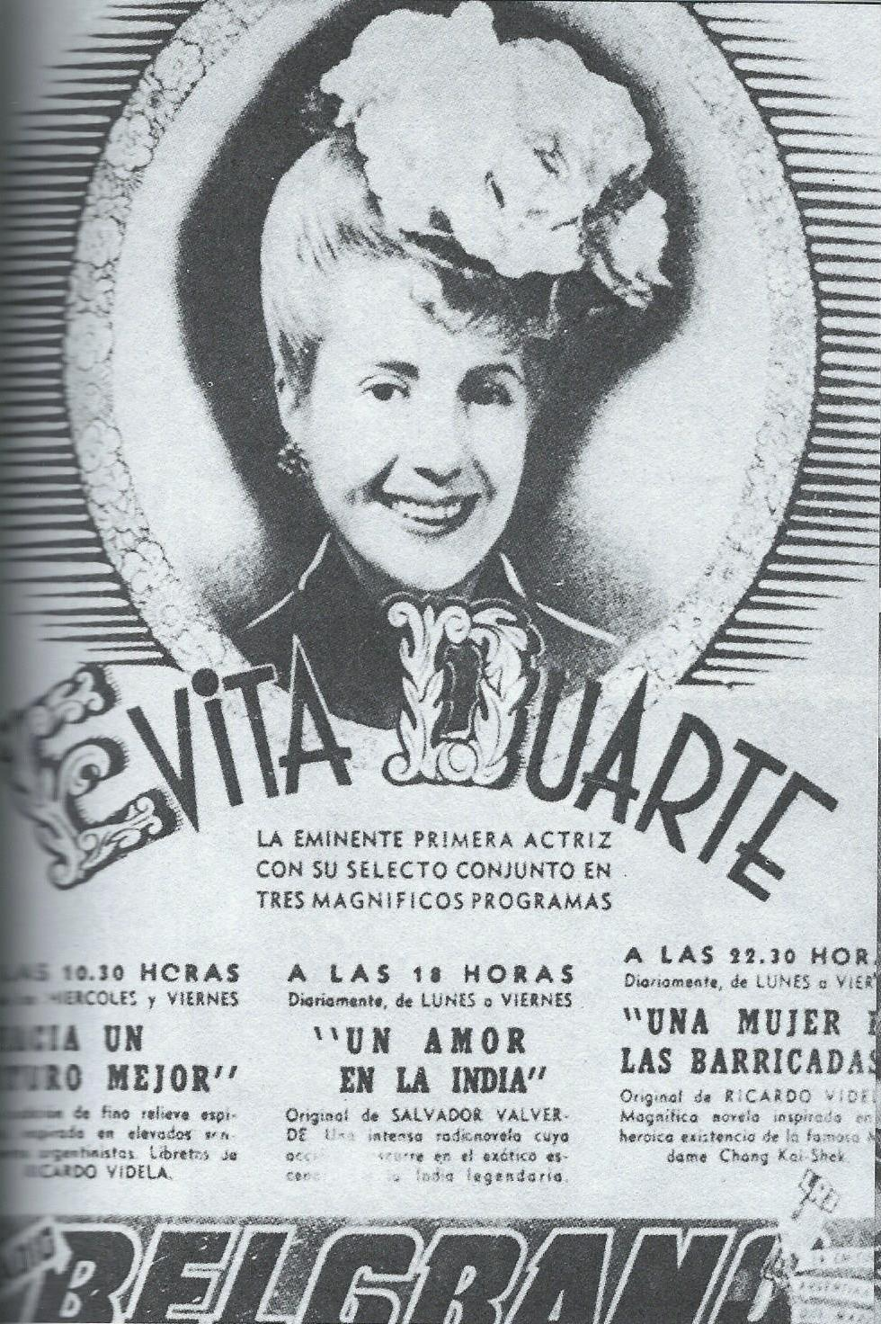 Eva Perón, affiche pour ses émissions sur Radio Belgrano, Buenos Aires. Vers 1944.